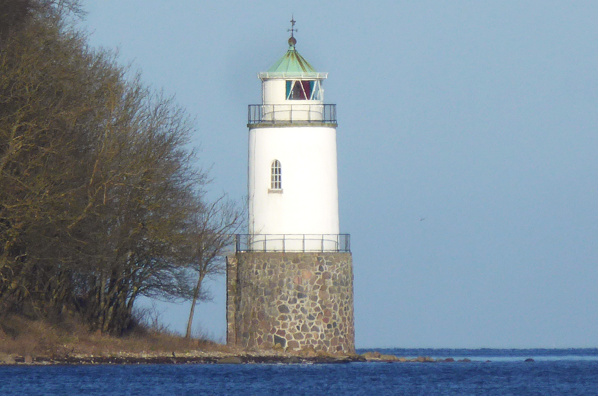 Taksensand Fyr (auch Taxensand). Leuchtturm von 1905 früher 33 m hoch, seit 1953 verkürzt auf 19 m. Insel Als Dänemark Foto Wolfgang Pehlemann P1030063